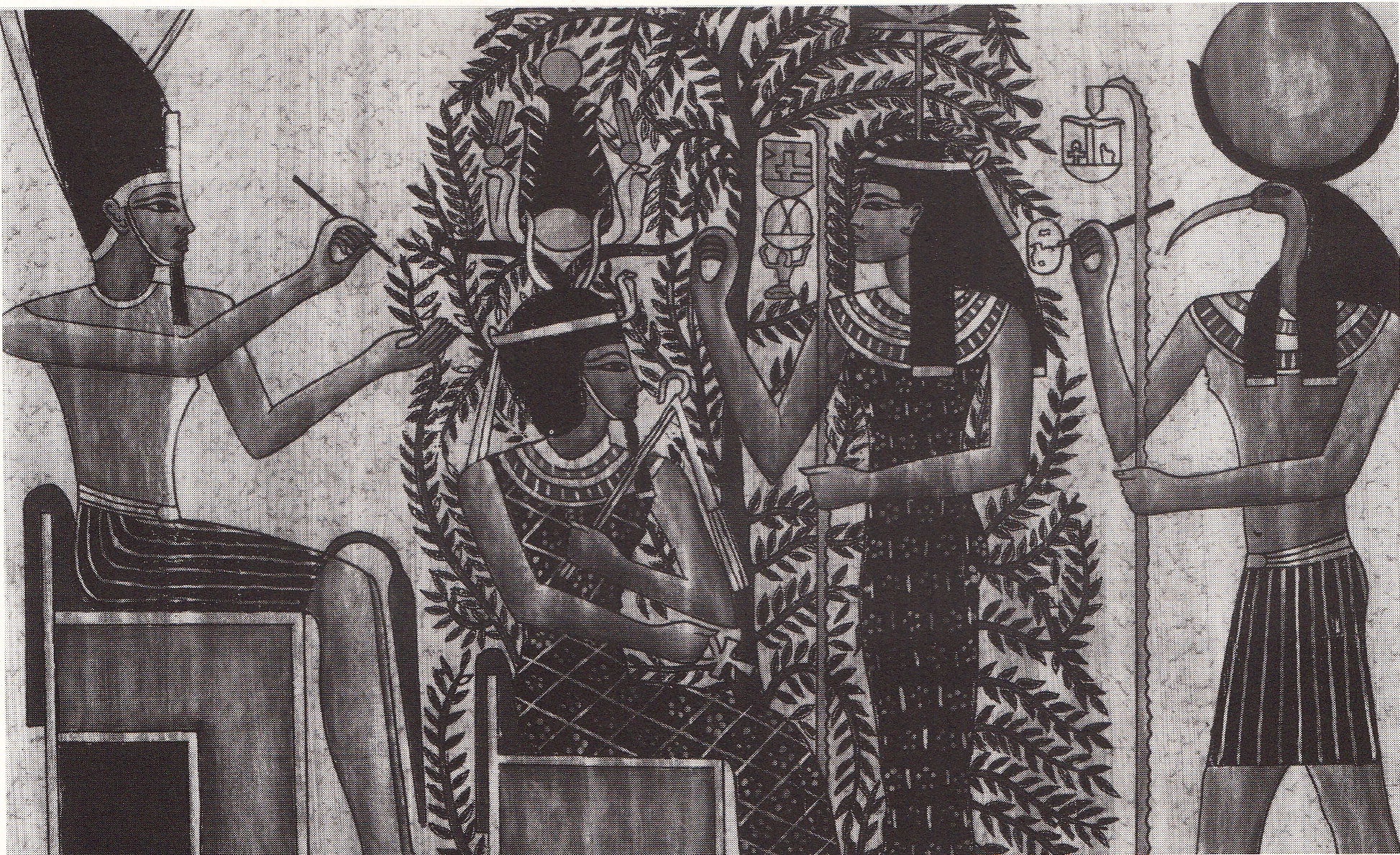 Ankleidungszeremonie, museales Geflecht aus Papyros